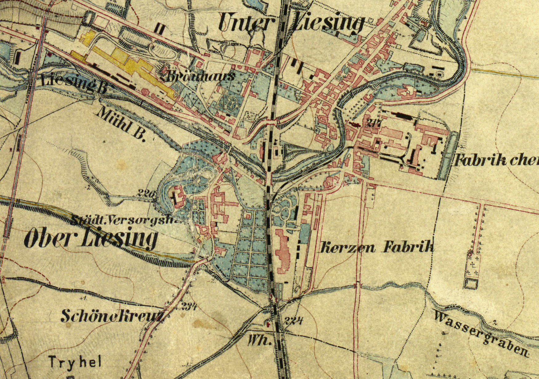 Liesing um 1872: „Kerzenfabrik“: Das Gelände der „Milly Kerzenfabrik“, der Sarg-Werke in Liesing bei Wien. Links oben das Gelände der Brauerei Liesing („Bräuhaus“), rechts oben der Chemiebetrieb von Wagenmann und Seybel (spätere HIAG, danach Donauchemie, danach siehe Altlastenkataster von Wien „1230 Wien Altlast W8“ ). Ausschnitt aus einer historischen Landkarte: Gradkartenblatt Zone 13 Colonne XIV Section b4 (später 4756/2d) der Franzisco-josephinischen (3.) Landesaufnahme der österreichisch-ungarischen Monarchie. Aufnahmeblatt 1:12.500. Aufgenommen 1872